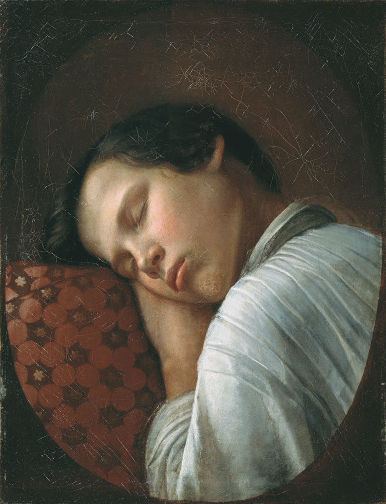 A Sleeping Boy. Портрет А. Тыранова (?)